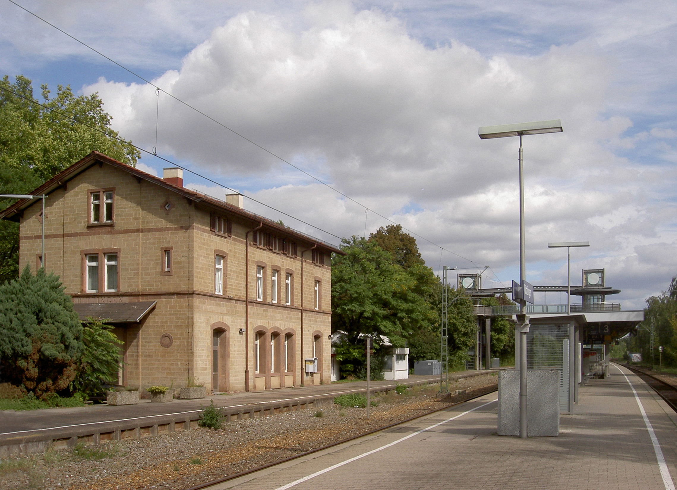 Bahnhof Ditzingen